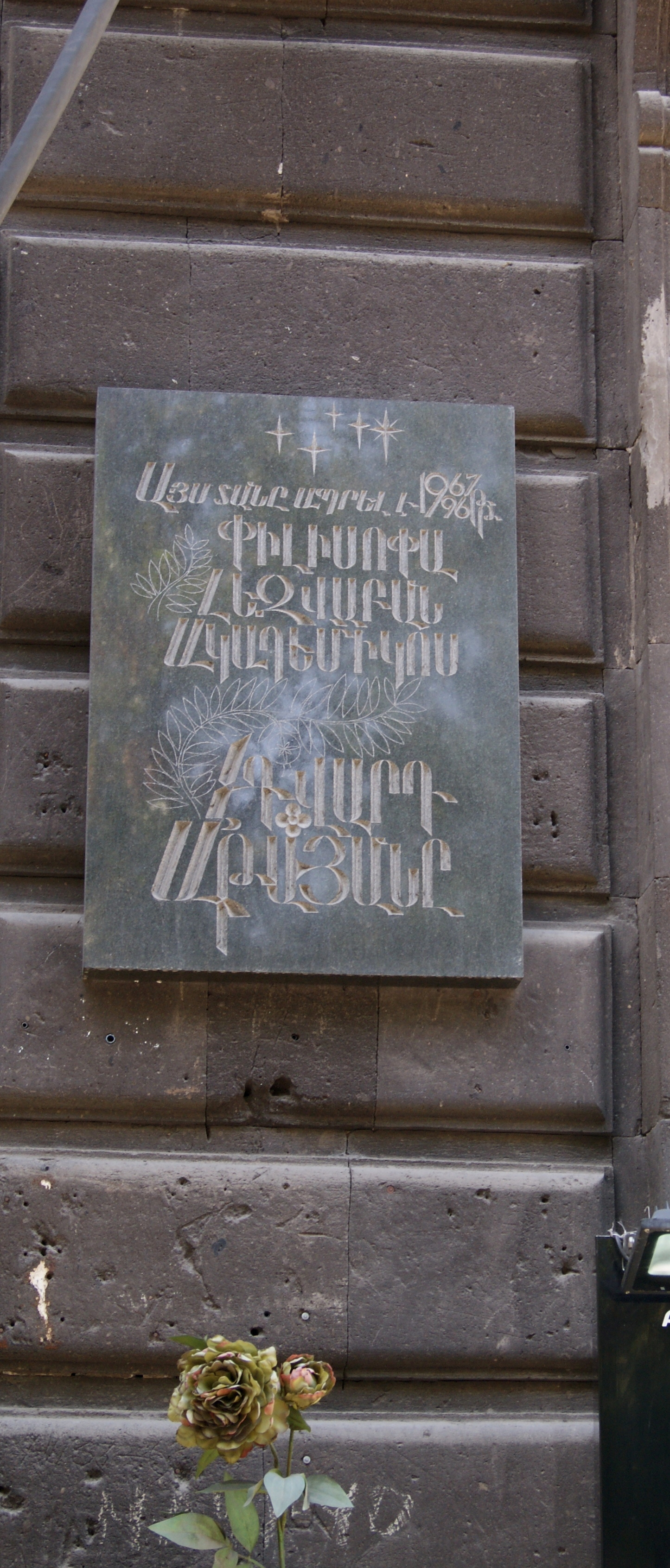 Edvard Atayan's plaque, Abovyan street 6/18